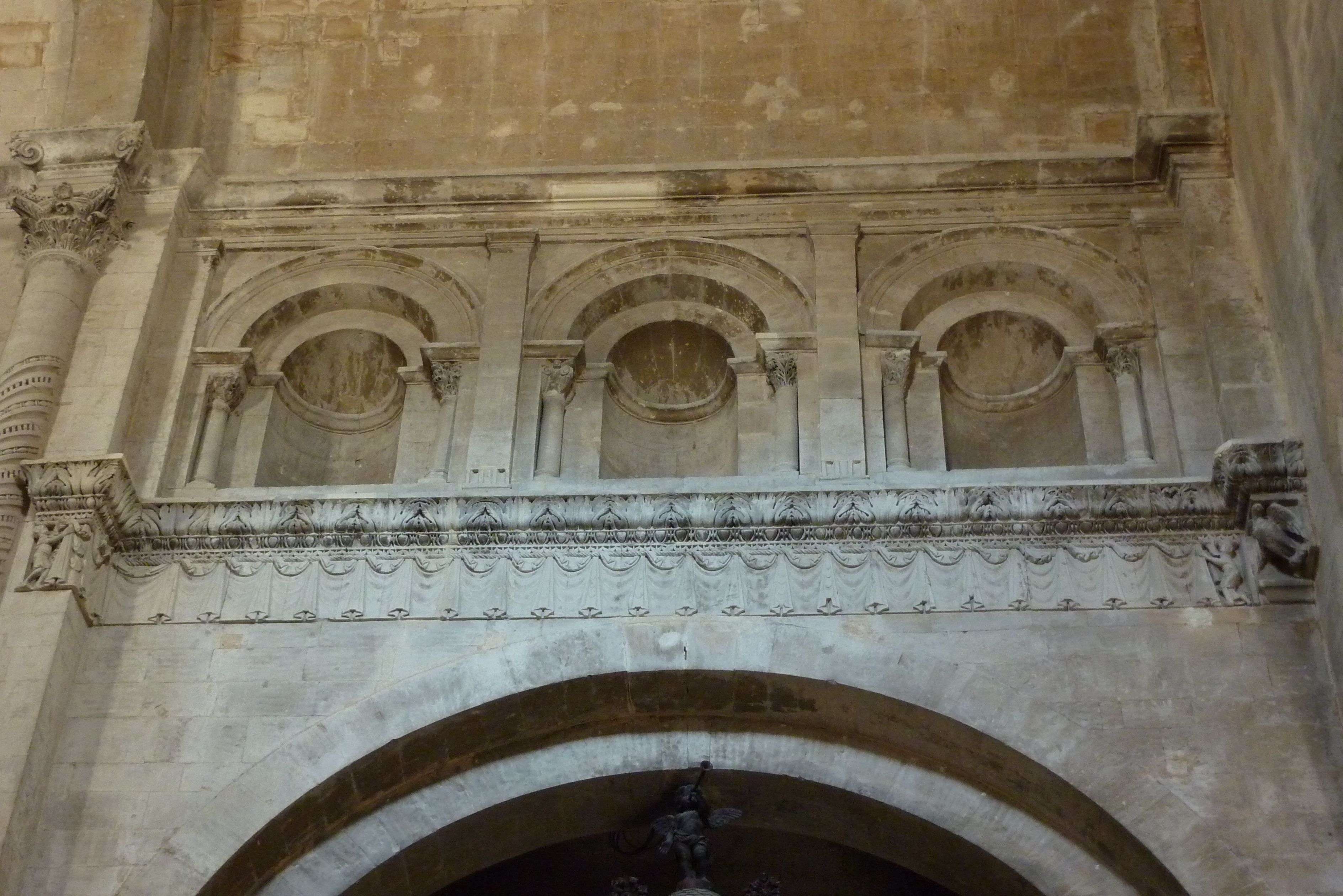 Kathedrale Notre-Dame in Saint-Paul-Trois-Châteaux